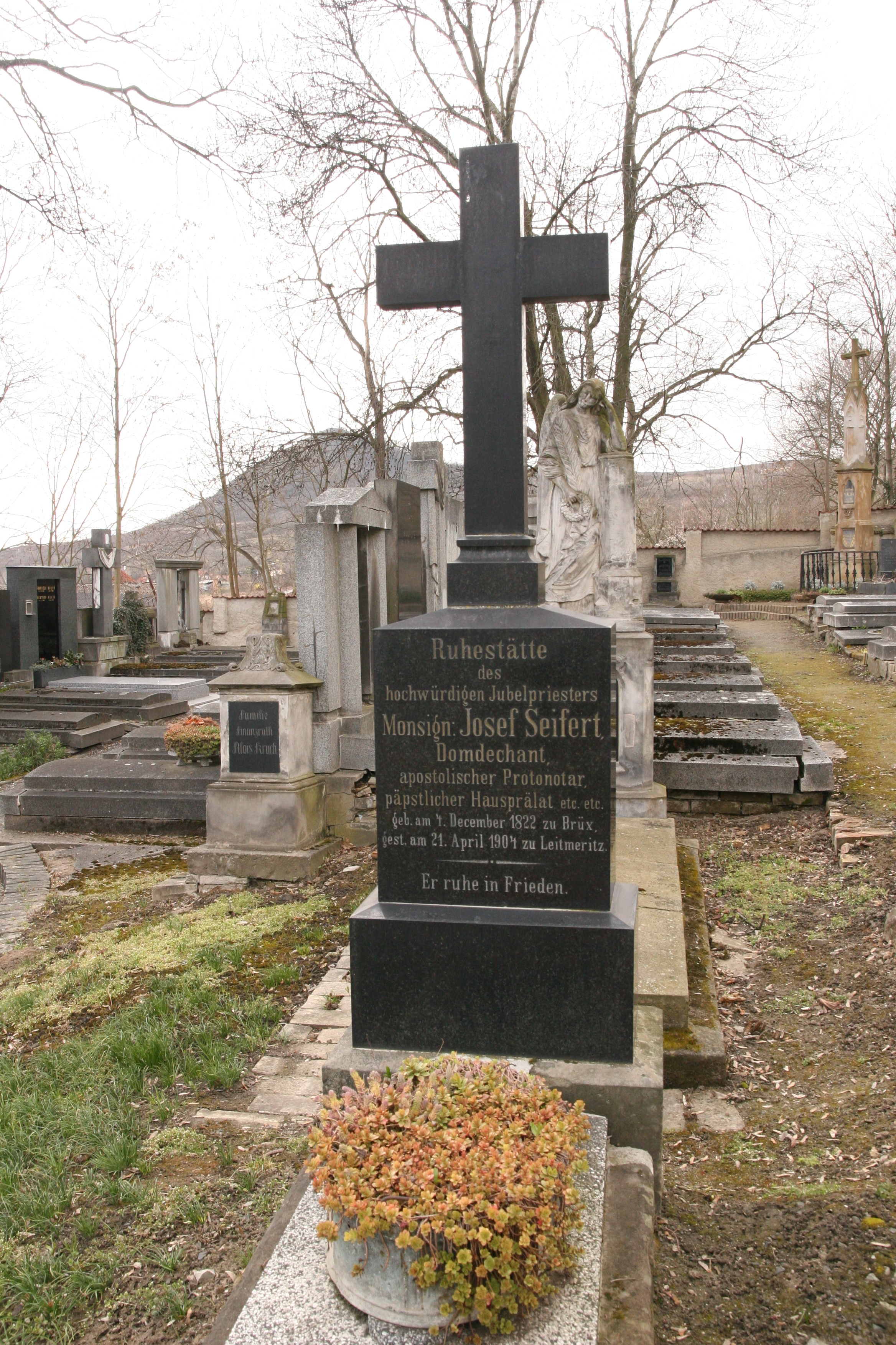 Hrob Msgre. Josefa Seiferta na městském hřbitově v Litoměřicích